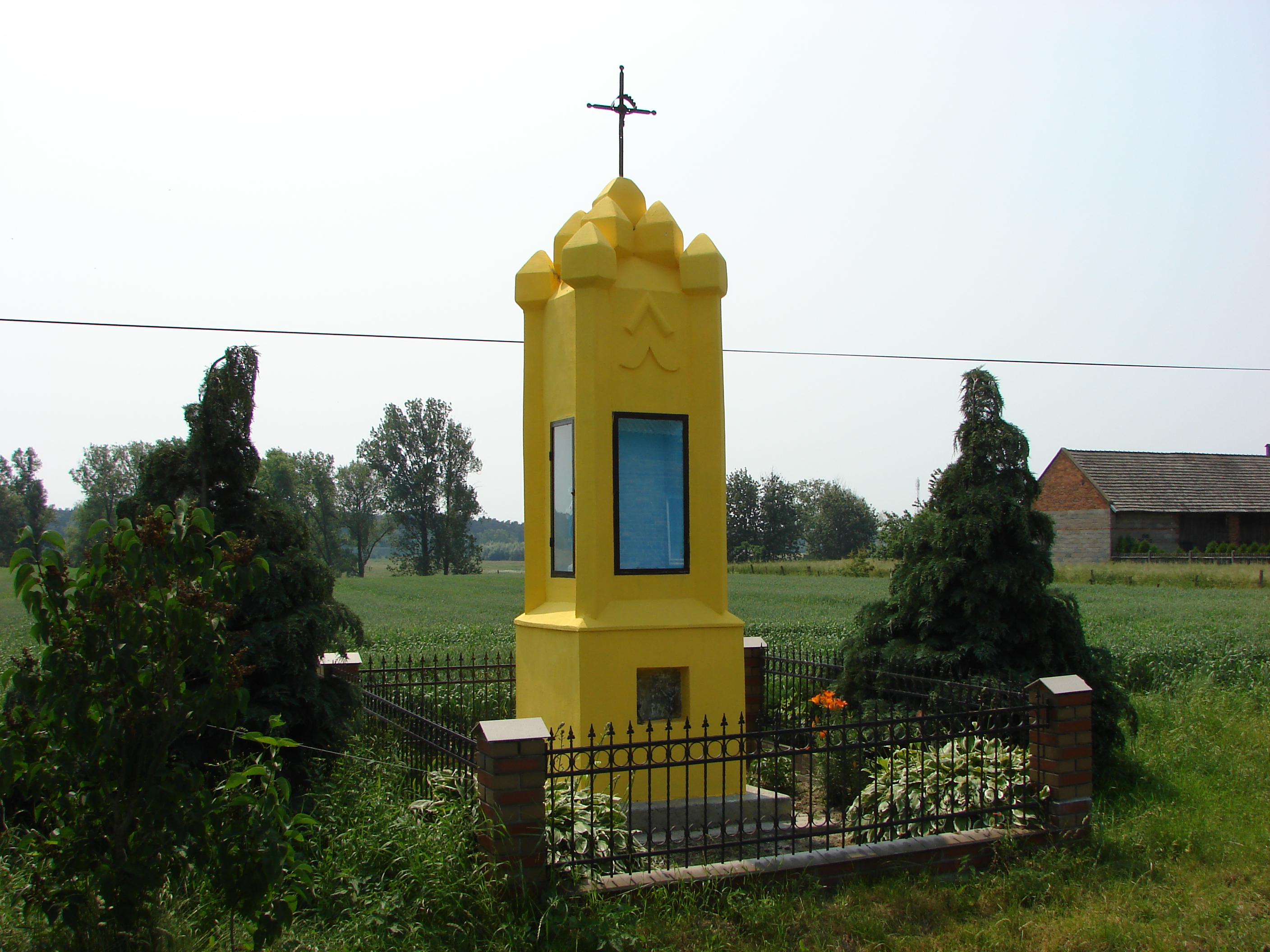 The wayside shrine.